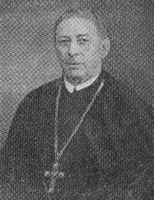 Alois Josef Kotyza (1869 - 1947), Benediktinský opat a děkan.